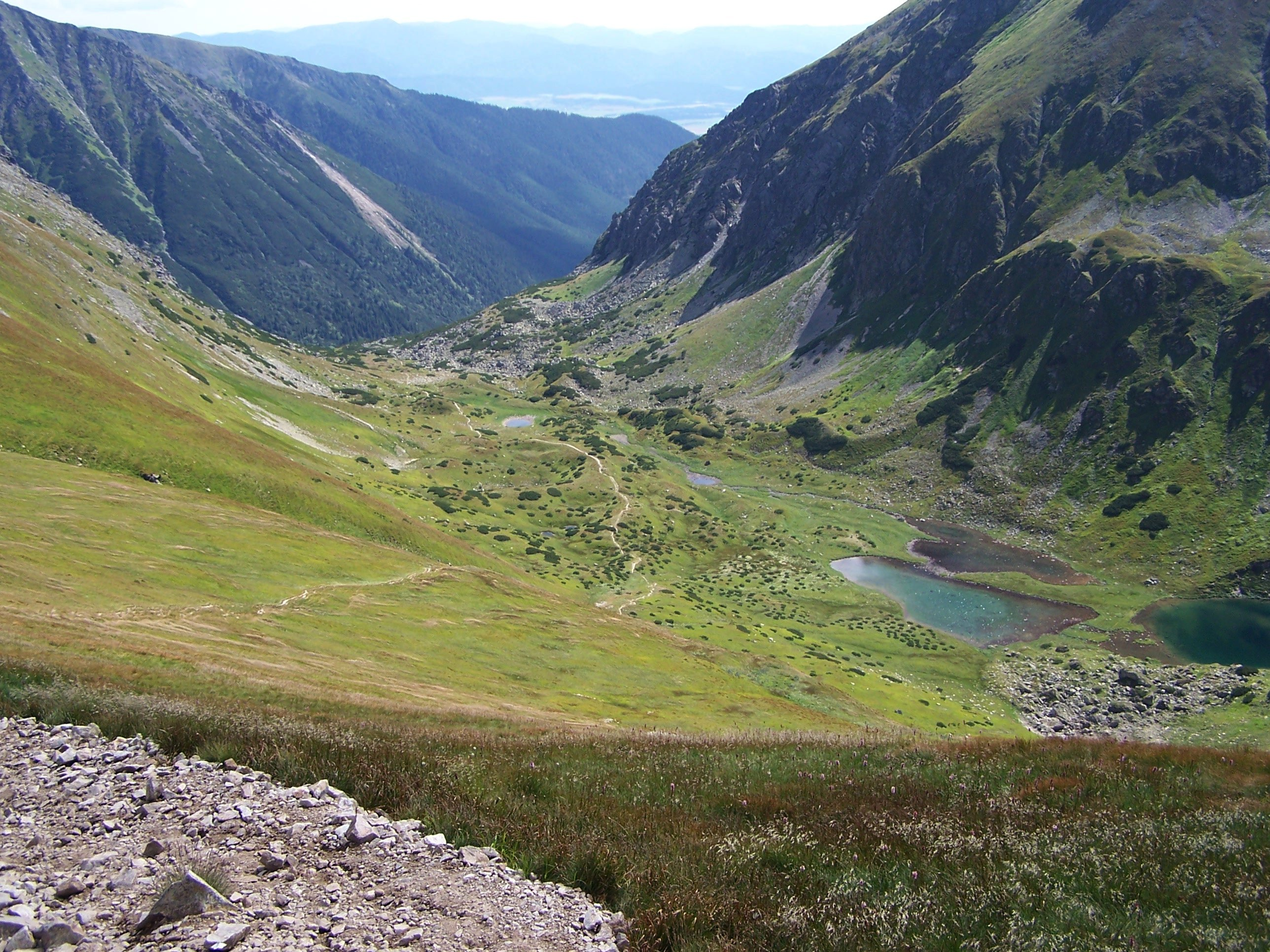 Raczkowa Dolina (Tatra Mountains )